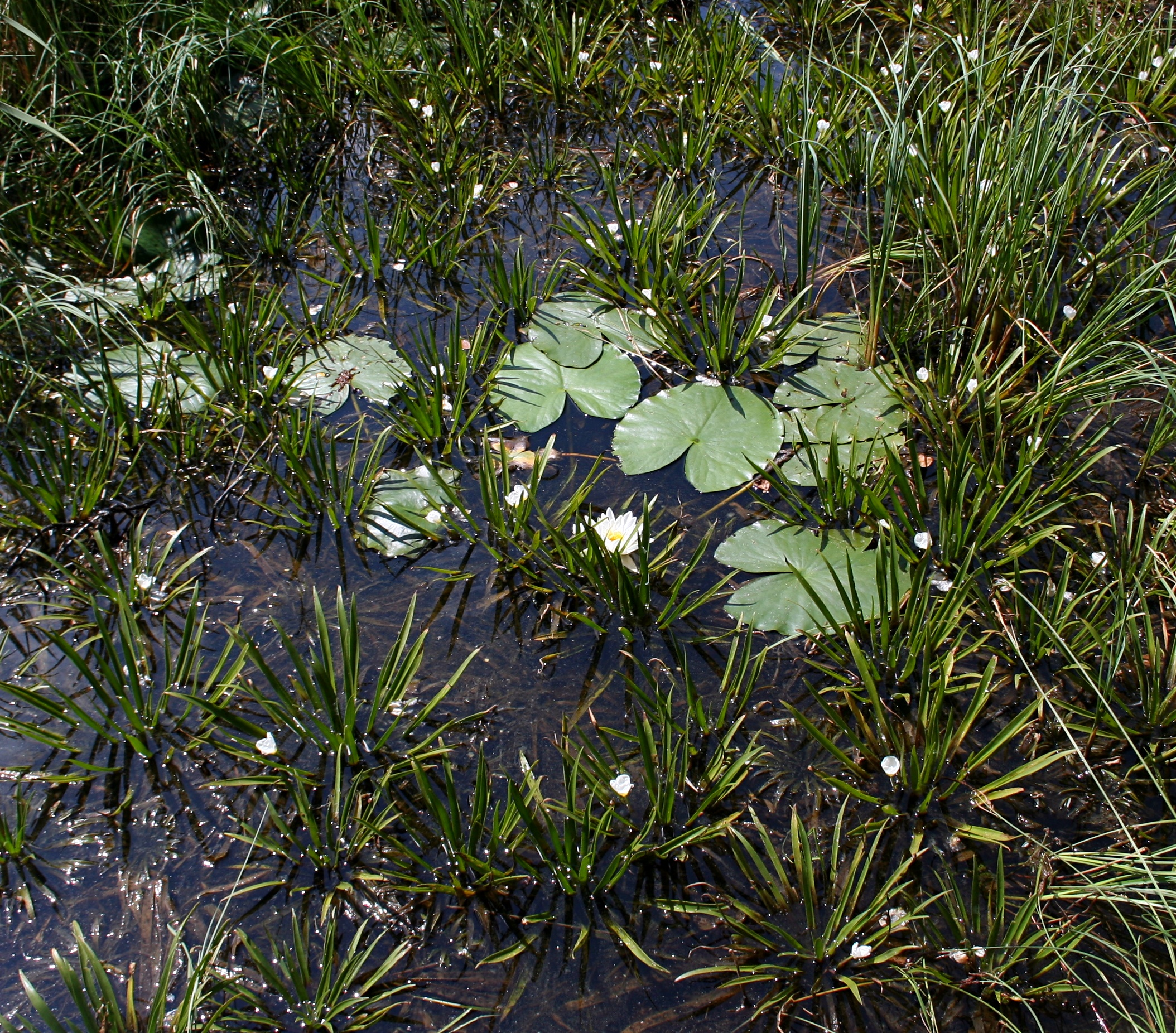 Wdzydzki Park Krajobrazowy, zbiorowisko osoki aloesowatej